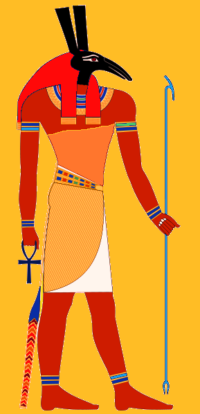 Dio egizio Seth